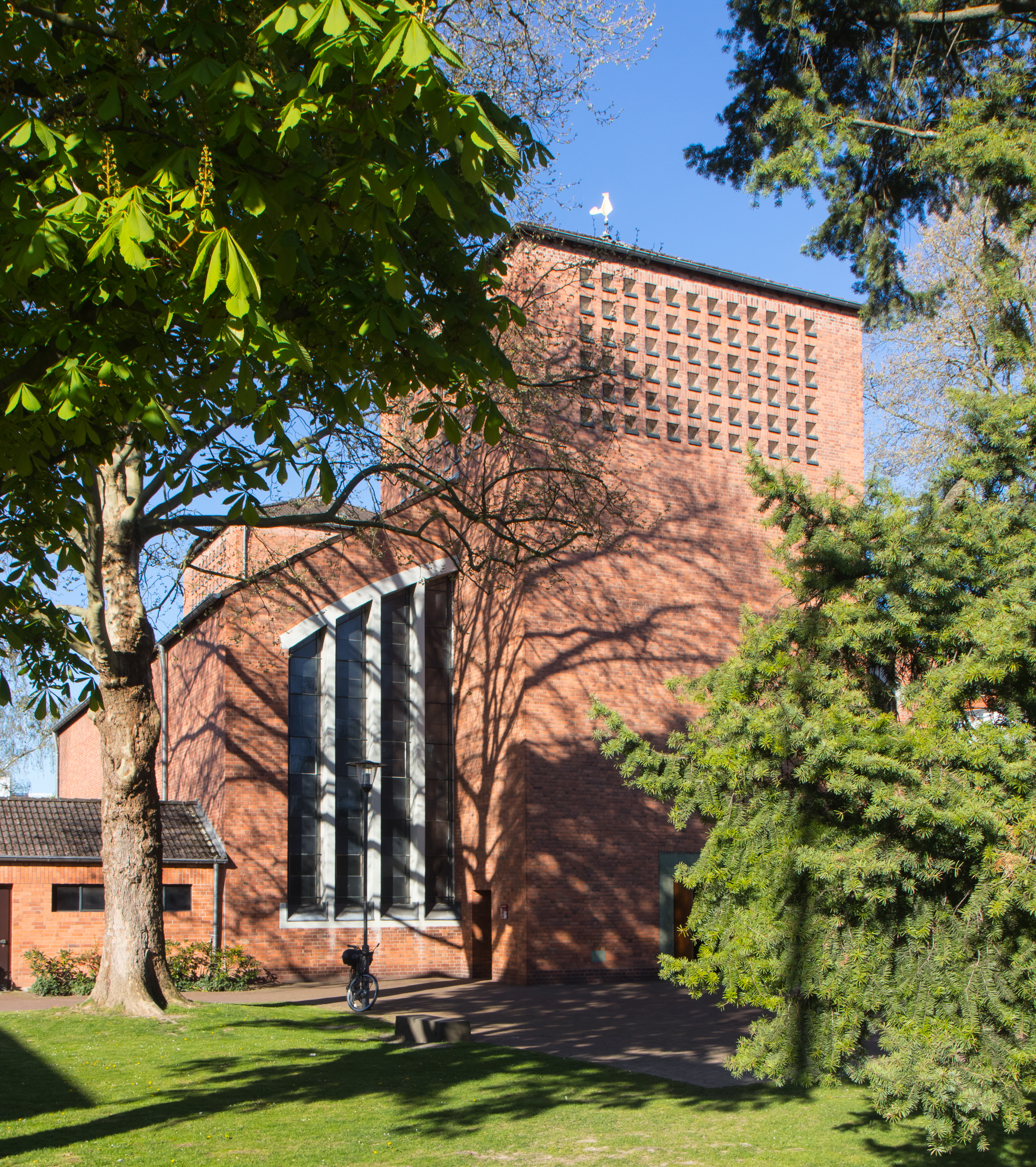 St. Joseph in Köln-Rodenkirchen, Architekt: Dominikus und Gottfried Böhm. (Blick von Südosten)